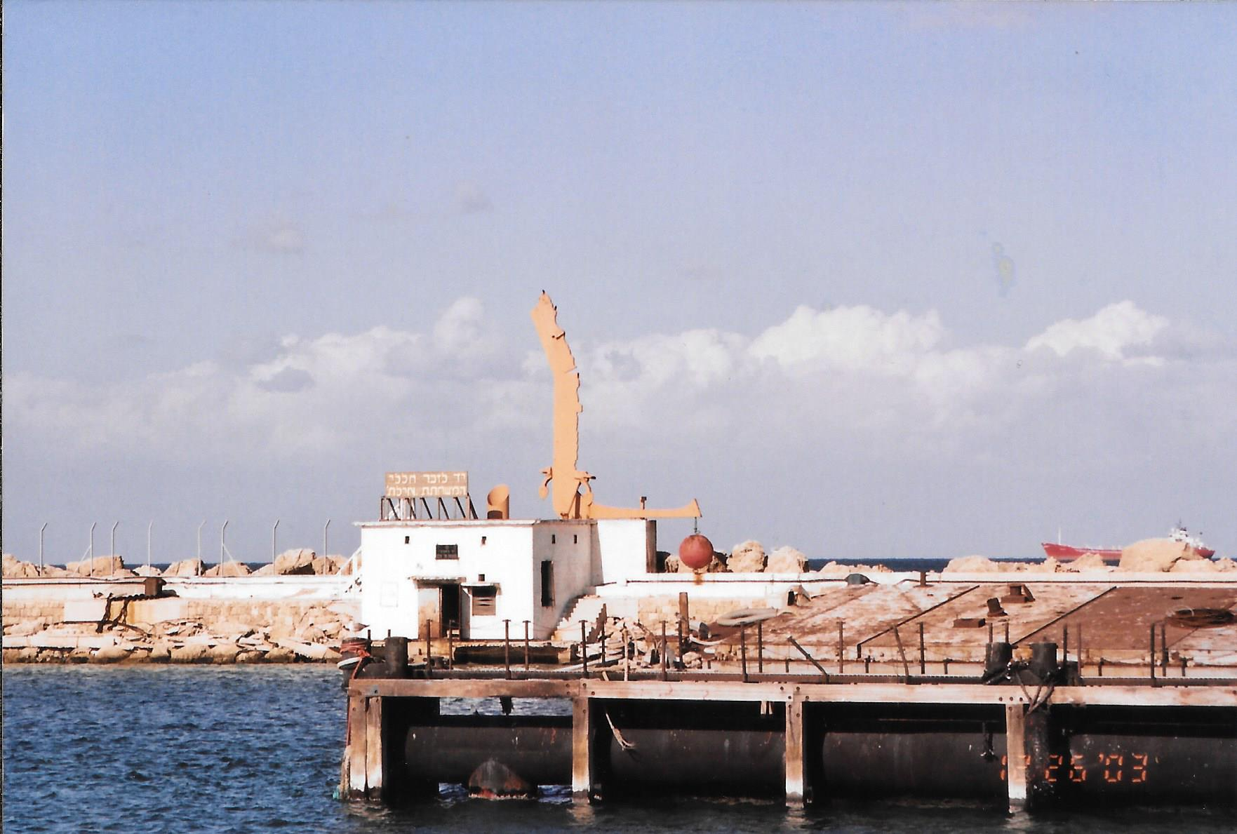 אנדרטה לחללי טיבוע המשחתת אילת של הפסל תומרקין על שובר הגלים הראשי בנמל חיפה 26 בדצמבר 2003